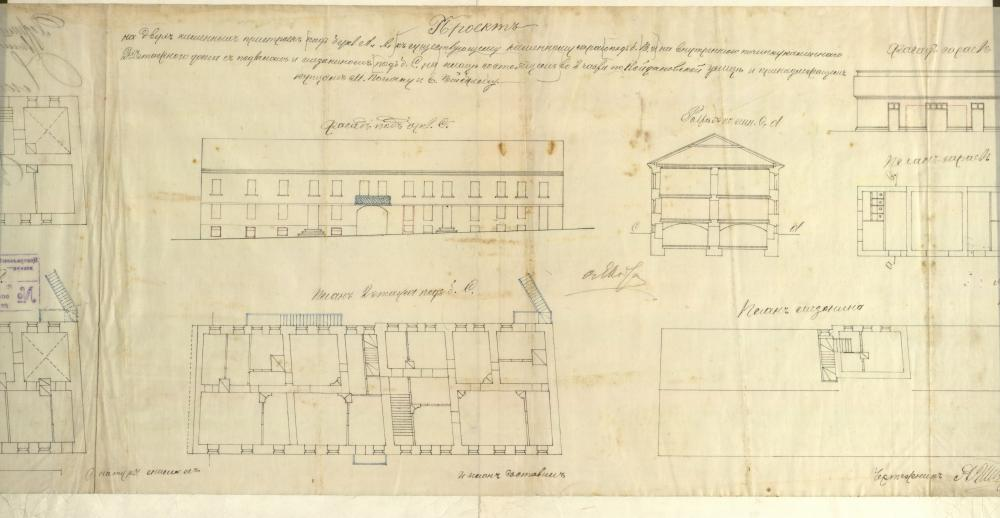 Беларуская (тарашкевіца): Менск (Miensk), вуліца Койданаўская (vulica Kojdanaŭskaja). Праект на рэканструкцыю мураванага двухпавярховага жылога дома і гаспадарчых пабудоваў купцоў М. Поляка і Е. Вейсбрэма